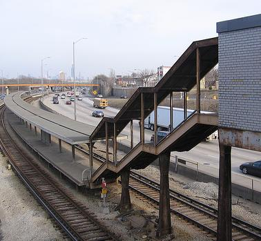 Photo de Kostner abandonée